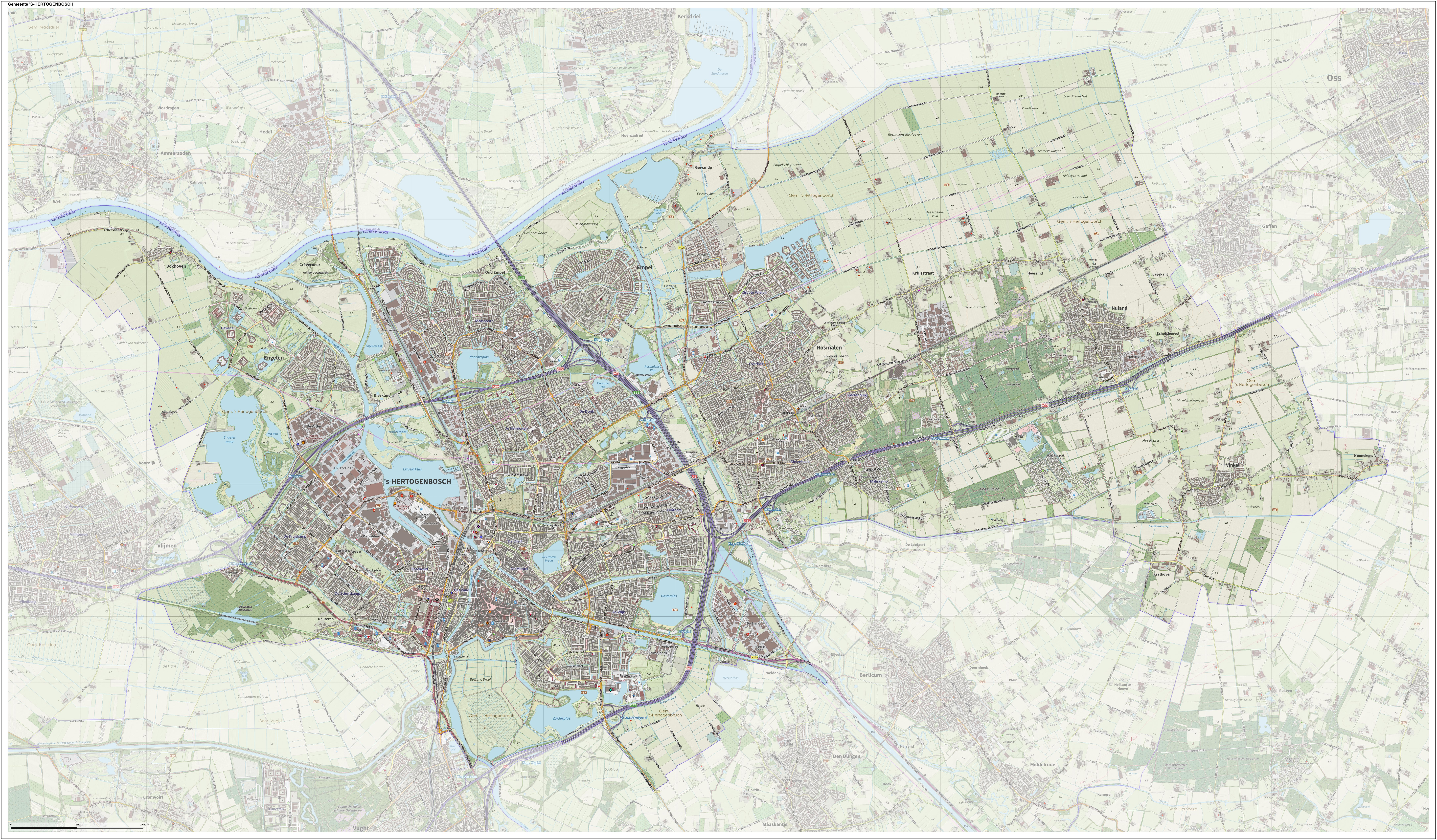 Topografische gemeentekaart. Resolutie: 400 pixels/km. Kaartbeeld samengesteld uit de open geodata van de Top10NL en Top25namen (Kadaster), Creative Commons-BY licentie. Gebouwvlakken uit open geodata BAG extract. Wegen uit de OpenStreetMap, OpenStreetMap community. Reliëfschaduw uit de Actuele Hoogtekaart AHN2. Samenstelling en kleurenschema: Jan-Willem van Aalst, met QGIS. Zie ook de Legenda.